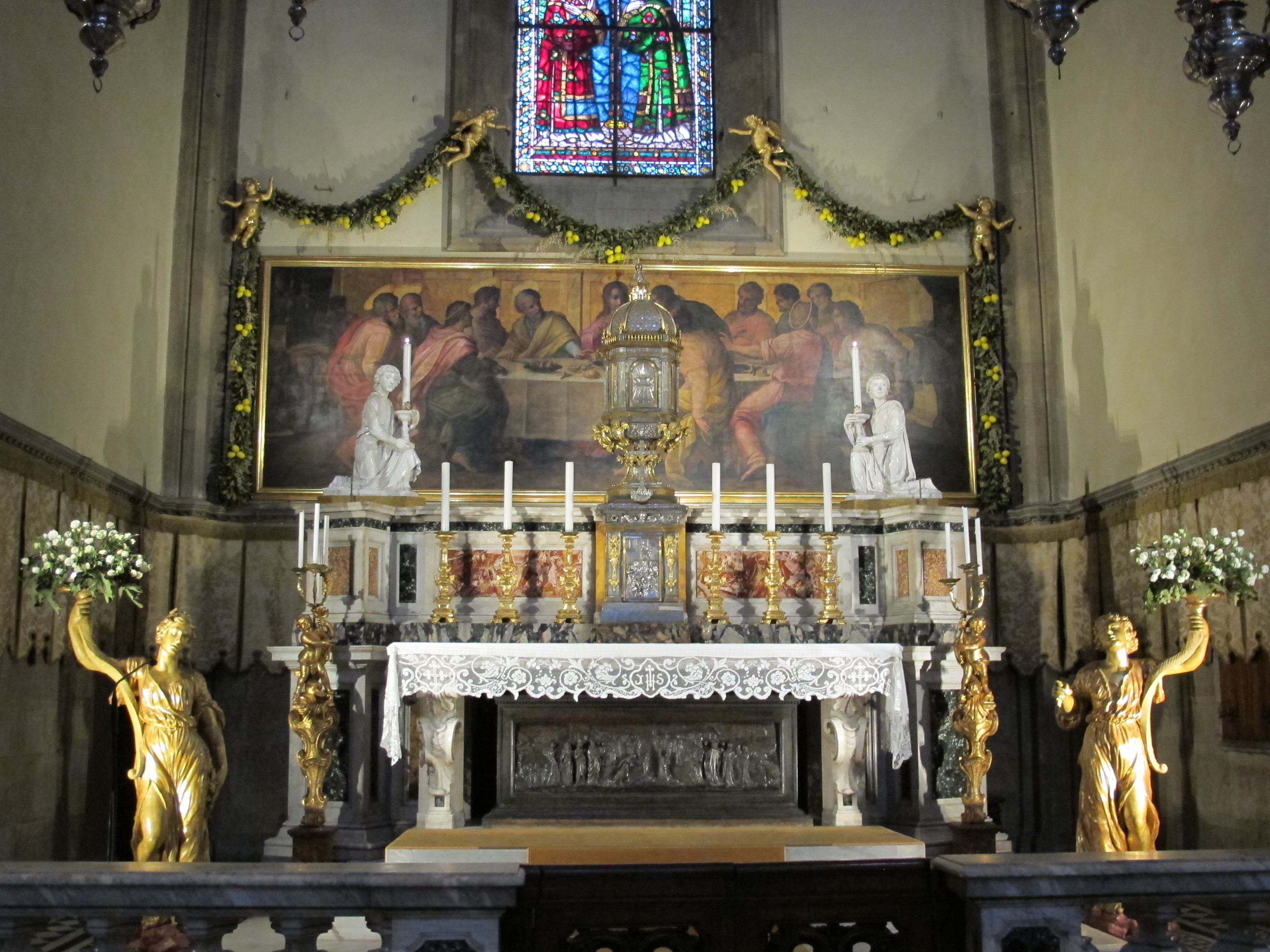 Santa maria del fiore, tribuna di san zanobi, altare di san zanobi 2